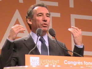 Photographie prise lors du discours de clôture du Congrès fondateur du Mouvement Démocrate (MoDem) à Villepinte (93), le 2 décembre 2007.